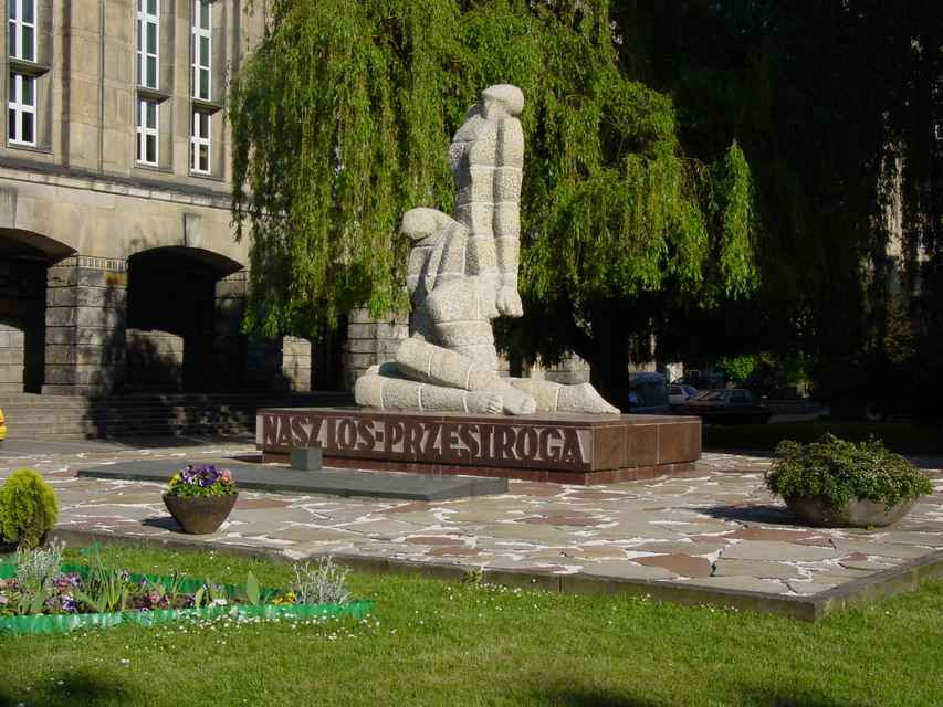 Stanislaw Kosiedowski, May 2005